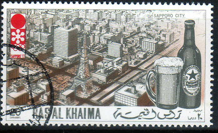 札幌オリンピックを記念して中東のラスアルハイマが発行した切手。描かれているのはサッポロビールとさっぽろ塔である。